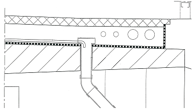 étanchéité du tablier Viaduc_de_Gières, gières